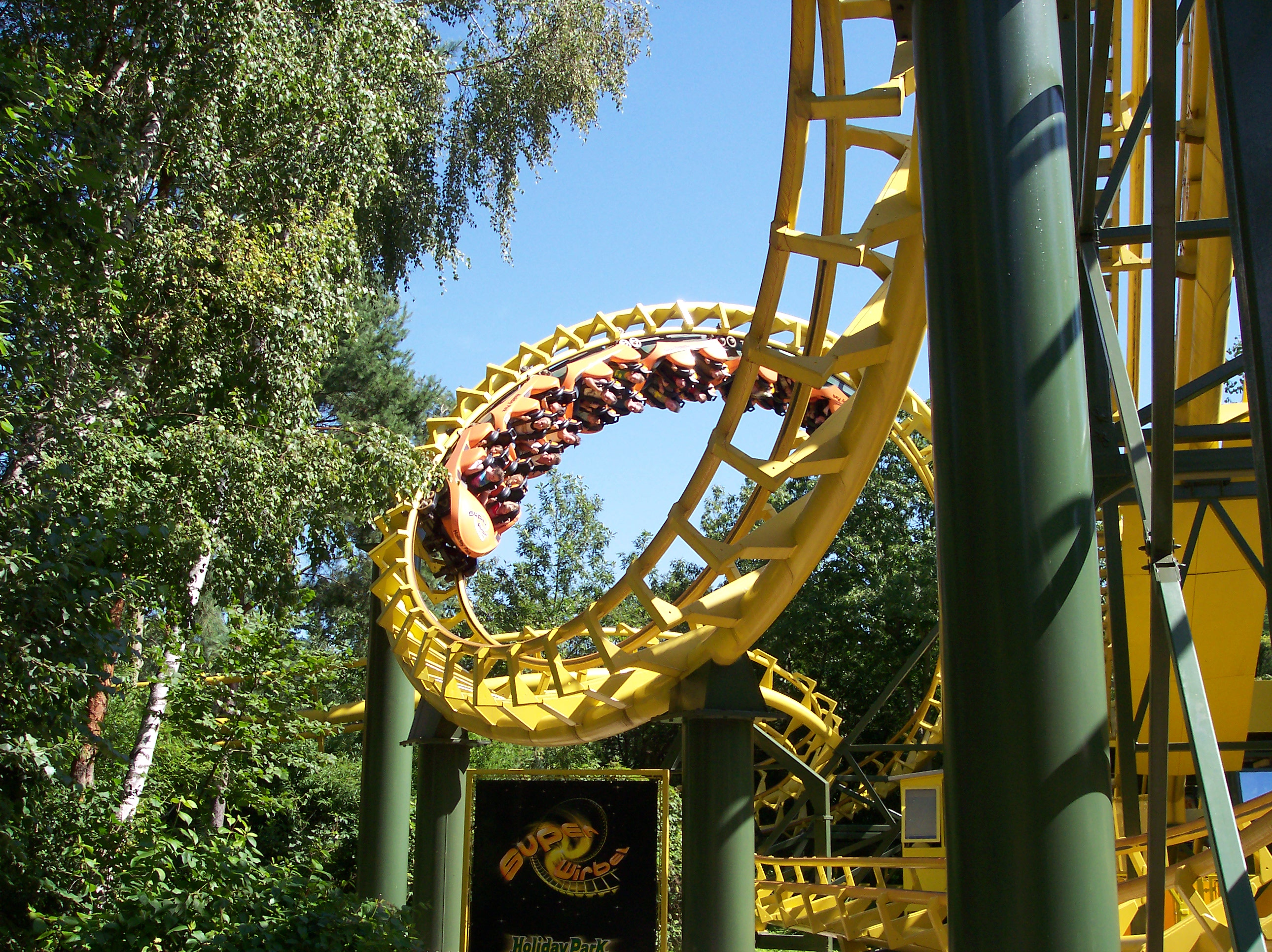 Blick auf den ersten Überschlag des Superwirbels, sowie das neue Logo.